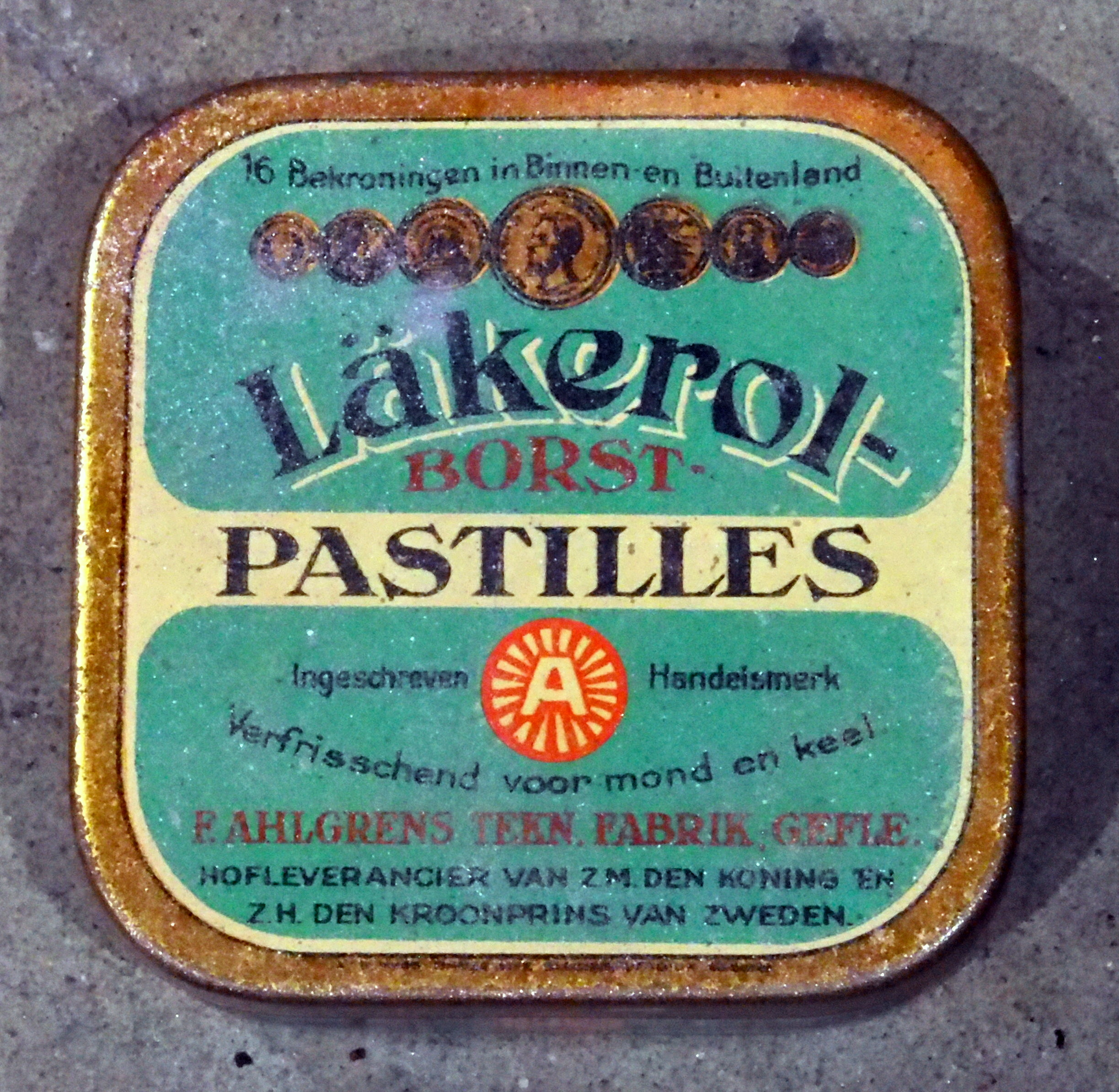 Läkerol borst pastilles.